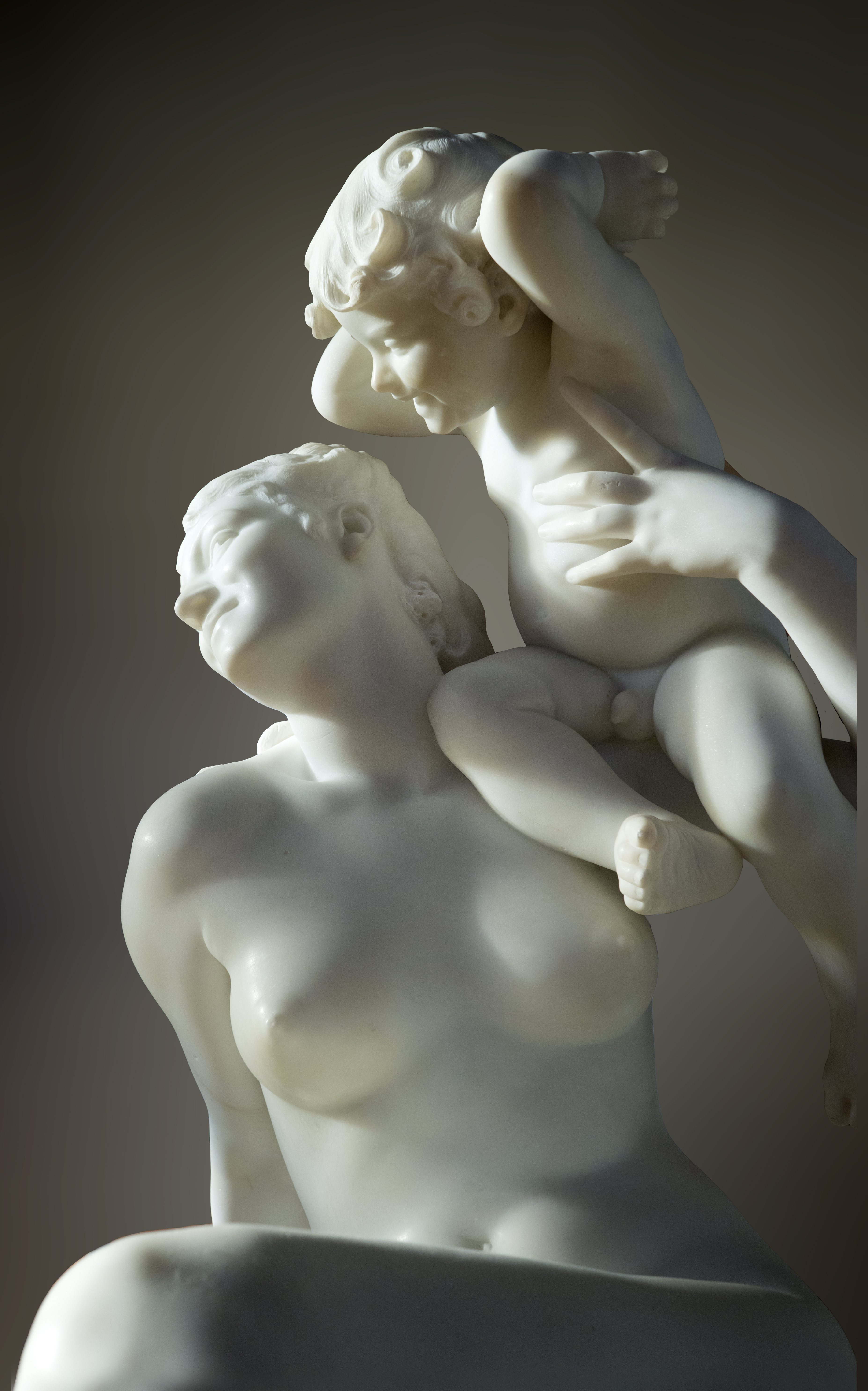 Vue de face, expression des sourires